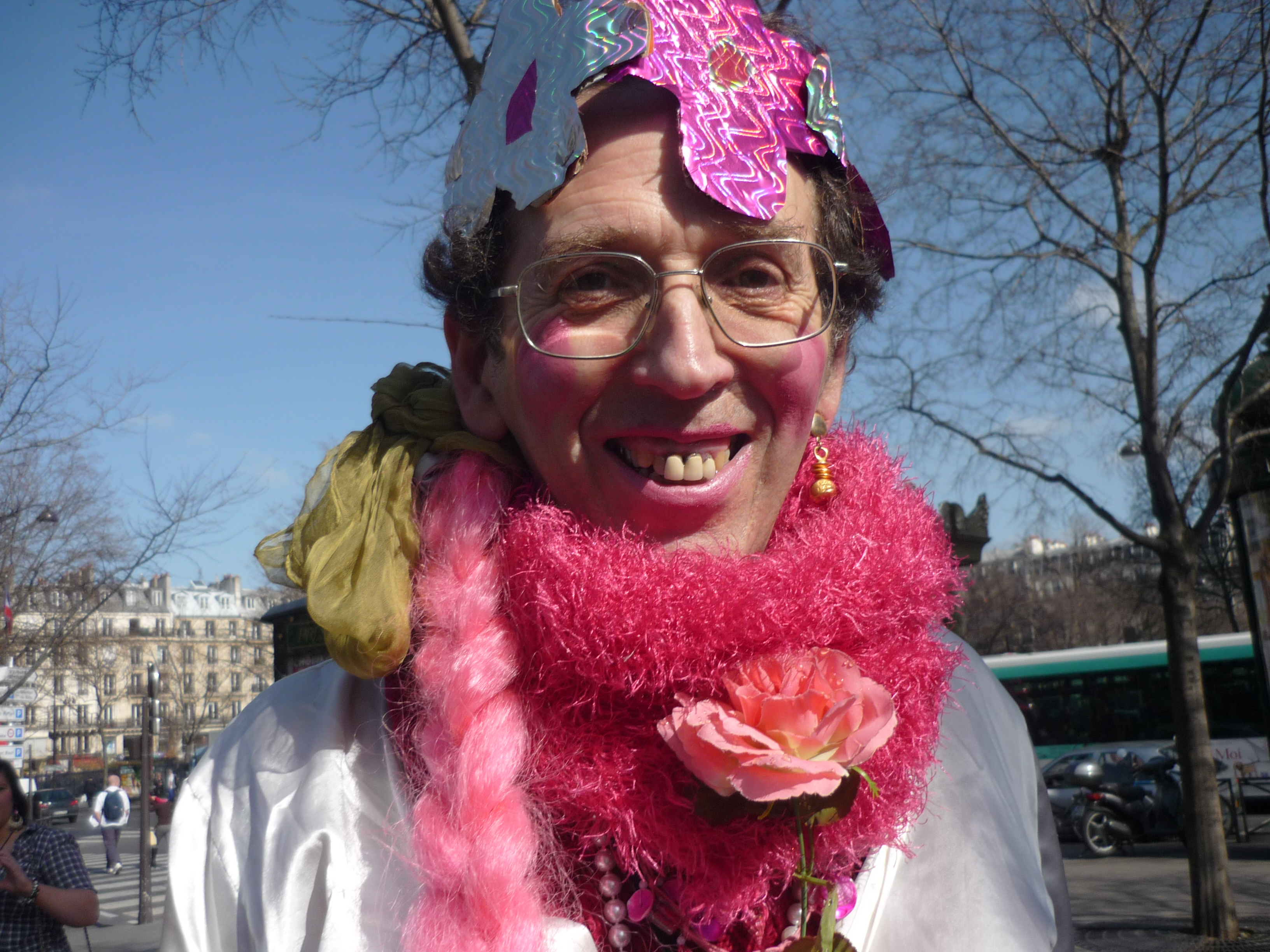 Les hommes en femmes à la Mi-Carême 2009 à Paris. 1ère réédition après environ 70 ans.